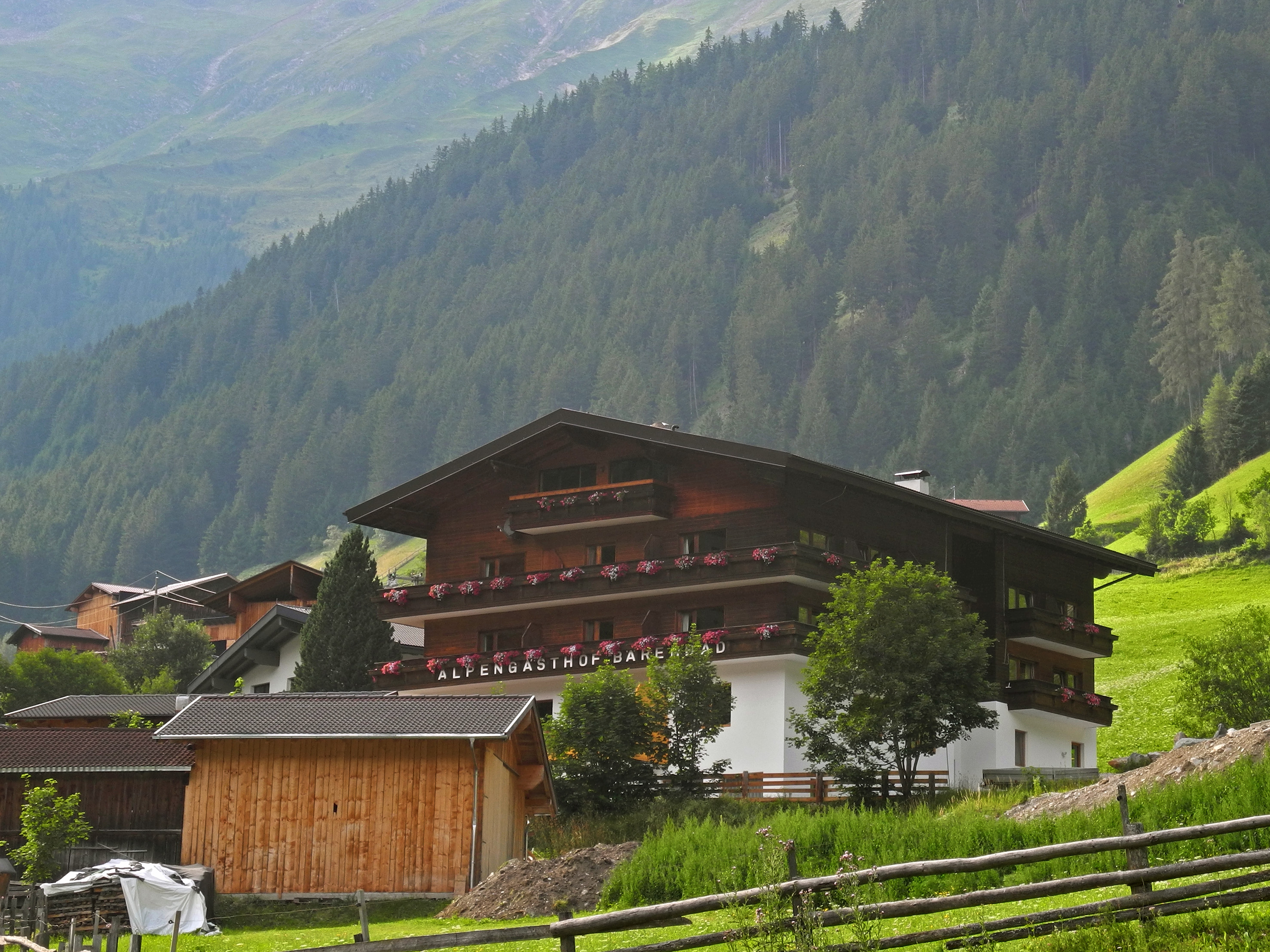 Weiler Bärenbad im Oberbergtal - neuer Gasthof Bärenbad